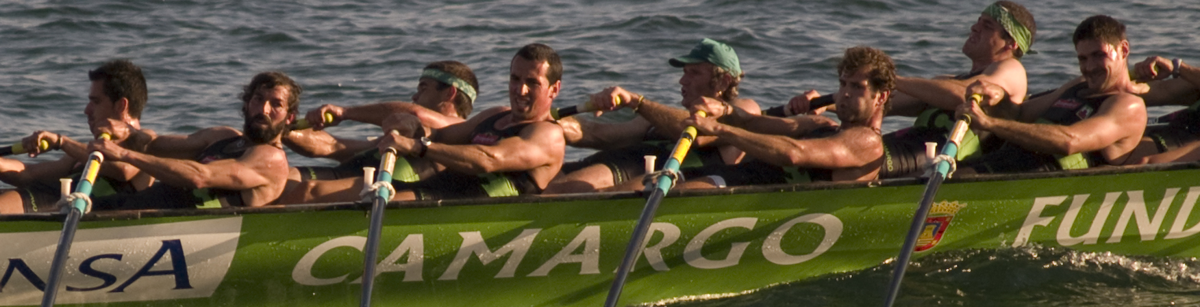 Remeros de la trainera de Camargo en Santander (Cantabria, España.)